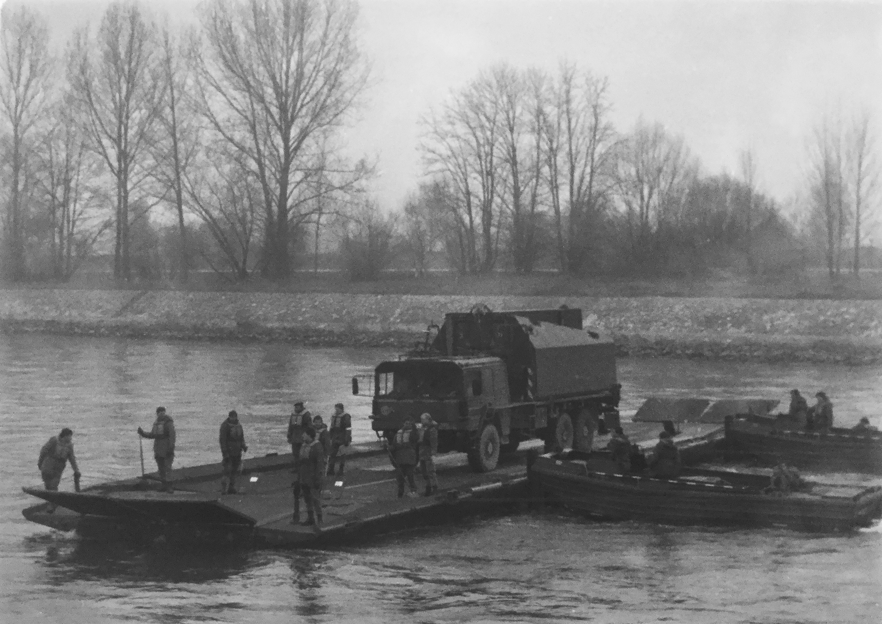 Faltschwimmbrücke der Bundeswehr 1983/84. PiBtl. 5/220L (FSB im Fährbetrieb). Fähre besteht aus zwei Innen-, zwei Rampenabschnitten und 2 M-Booten (klein). Auf der Fähre ein MAN 7tonner mit Rampenabschnitt